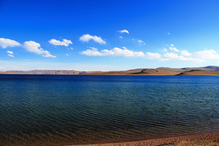 西藏自治区申扎县错鄂